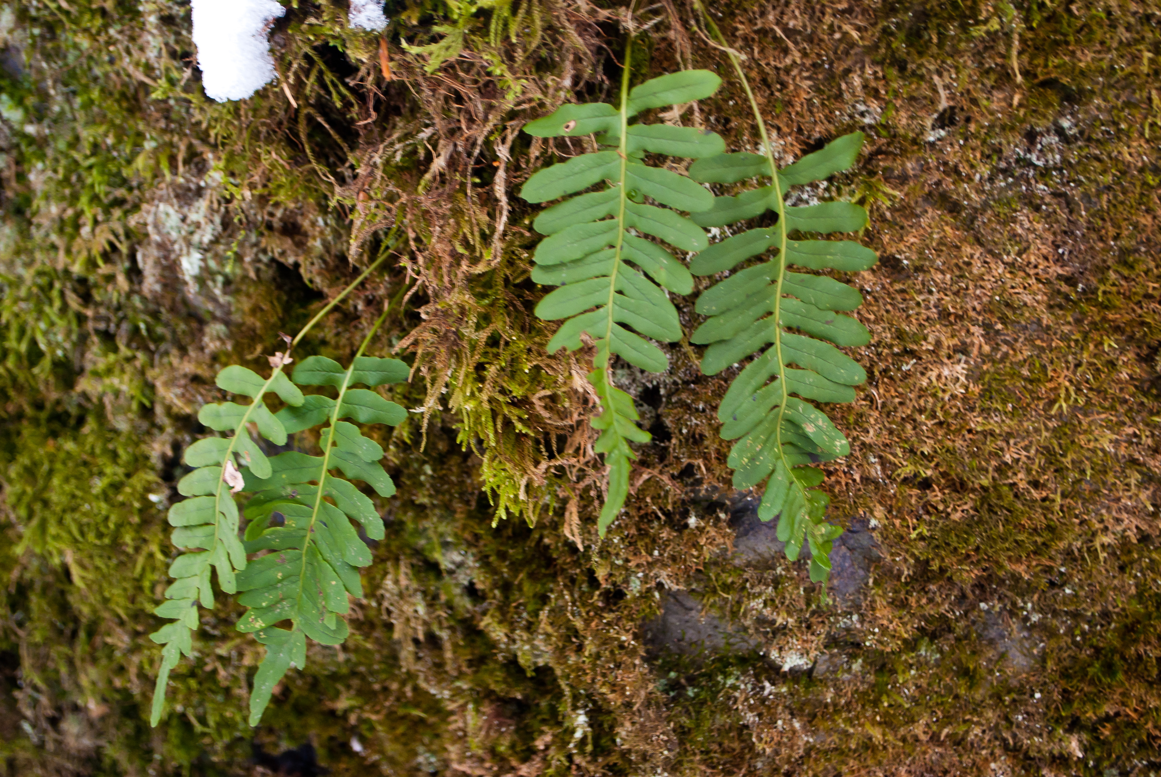 Багатоніжка звичайна (Polypodium vulgare) у підніжжя Ялинського водоспаду. Мармароський масив Карпатського біосферного заповідника.